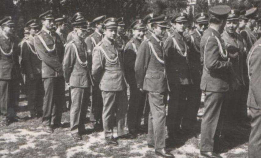 Garnizon Przasnysz. Kadra JW 4420 podczas uroczystości z okazji wręczenia sztandaru dla jednostki